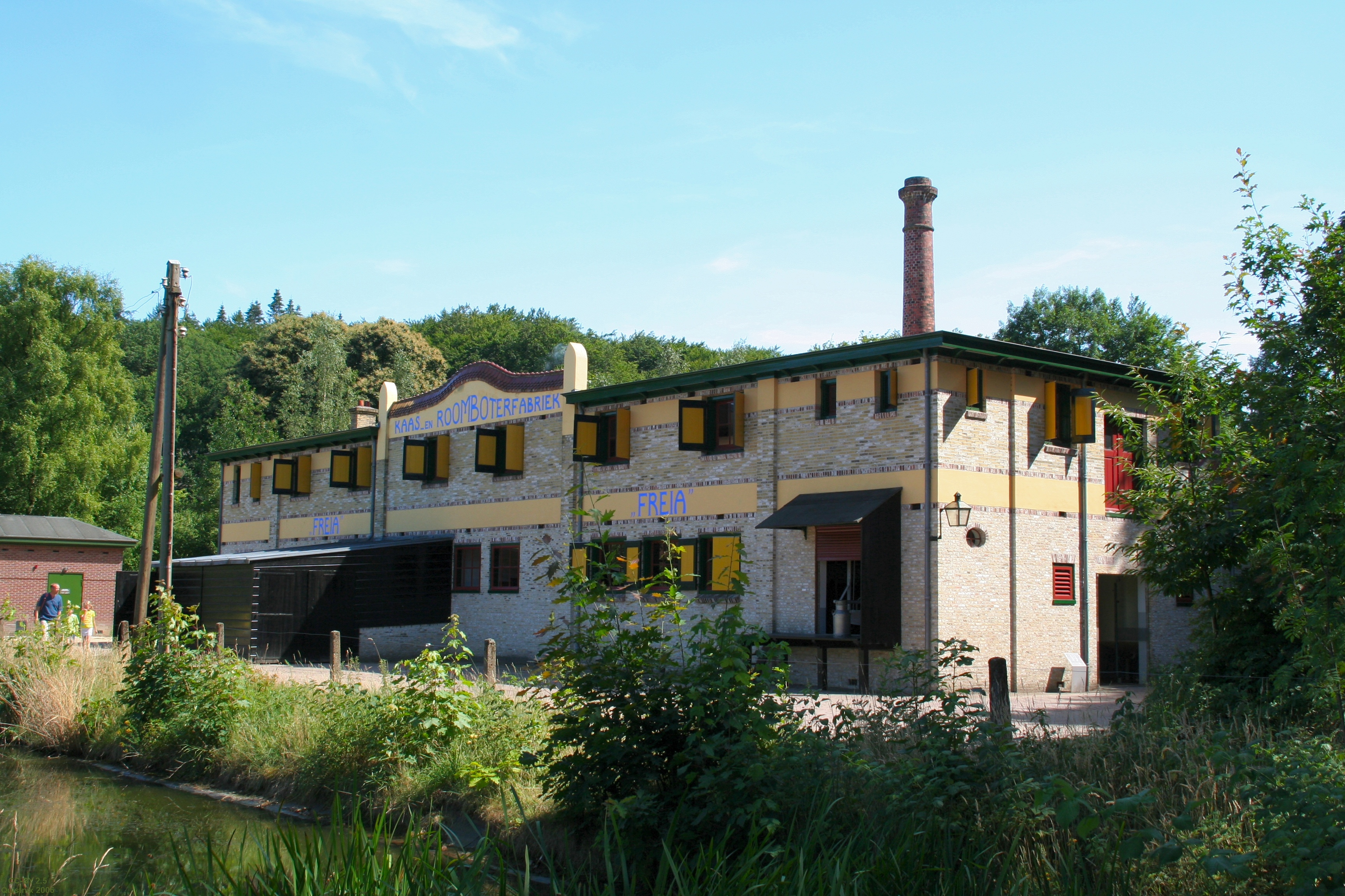 Zuivelfabriek "Freia", openluchtmuseum Arnhem. Eigen werk.